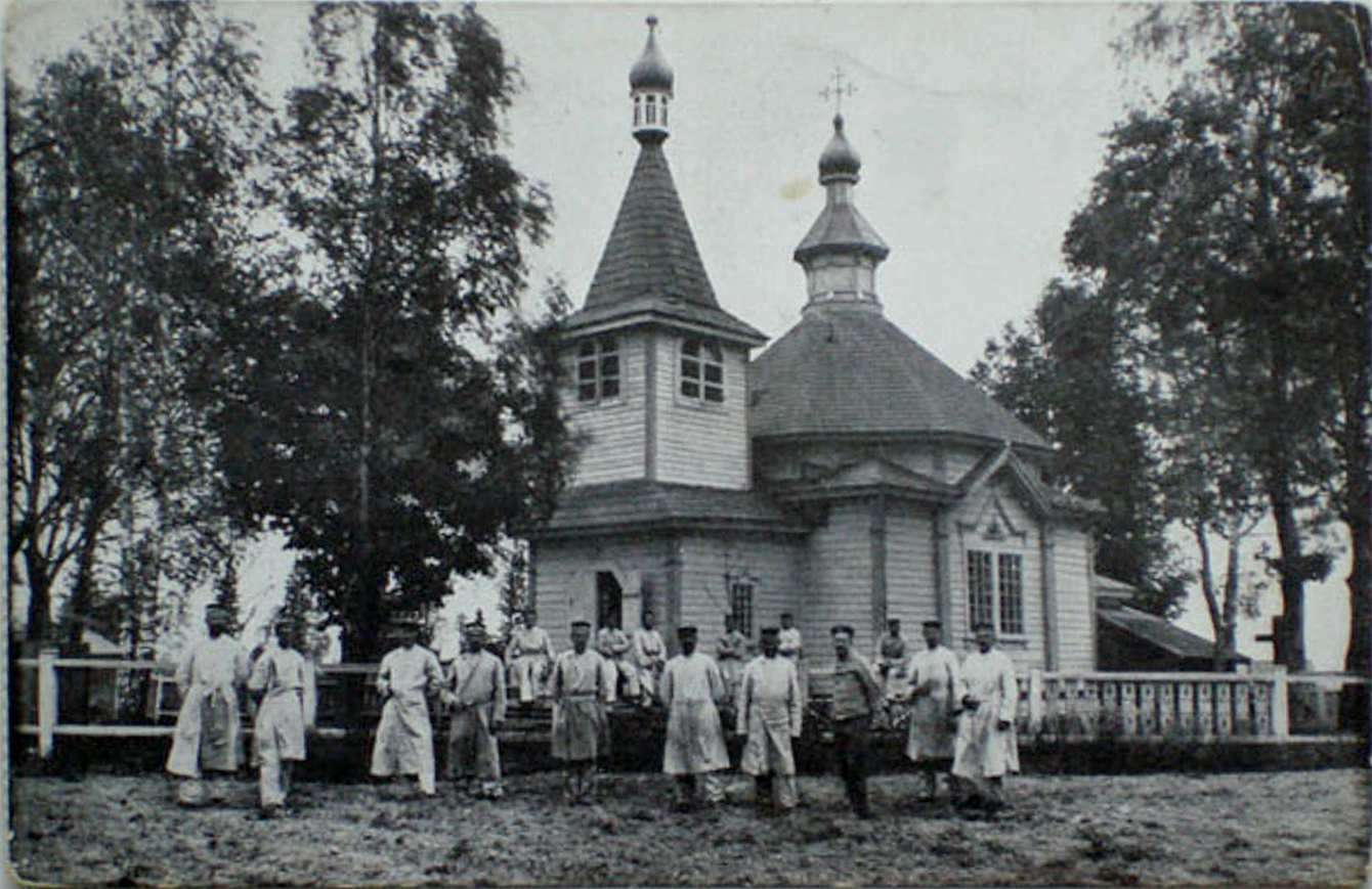 Беларуская (тарашкевіца): Высоцак (Vysocak). Царква